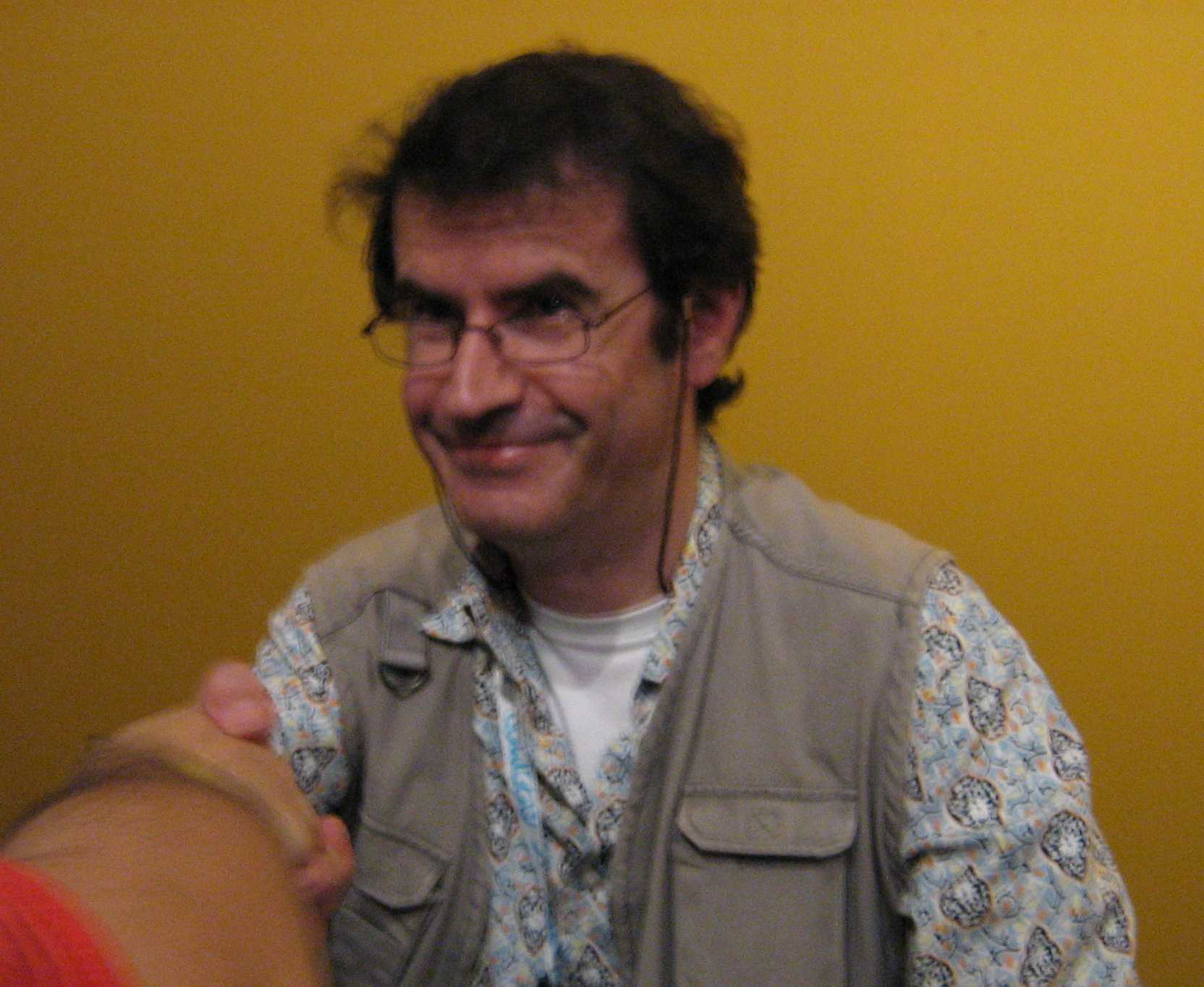 Roberto Baldazzini at Comicon 2007, Naples